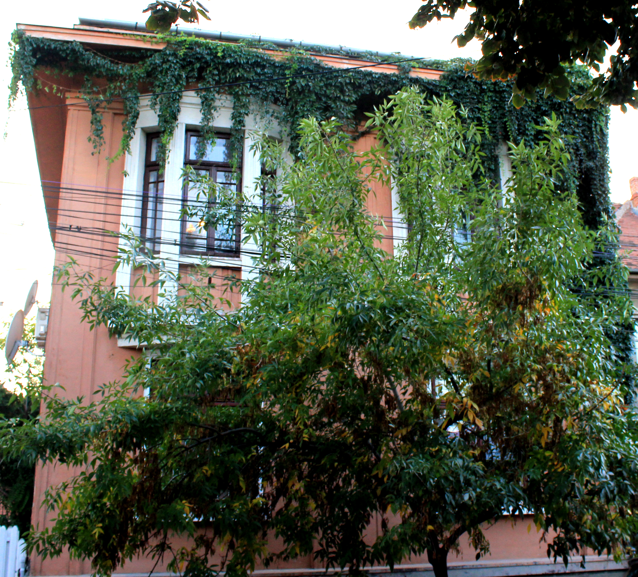 Casă Burghelea 22